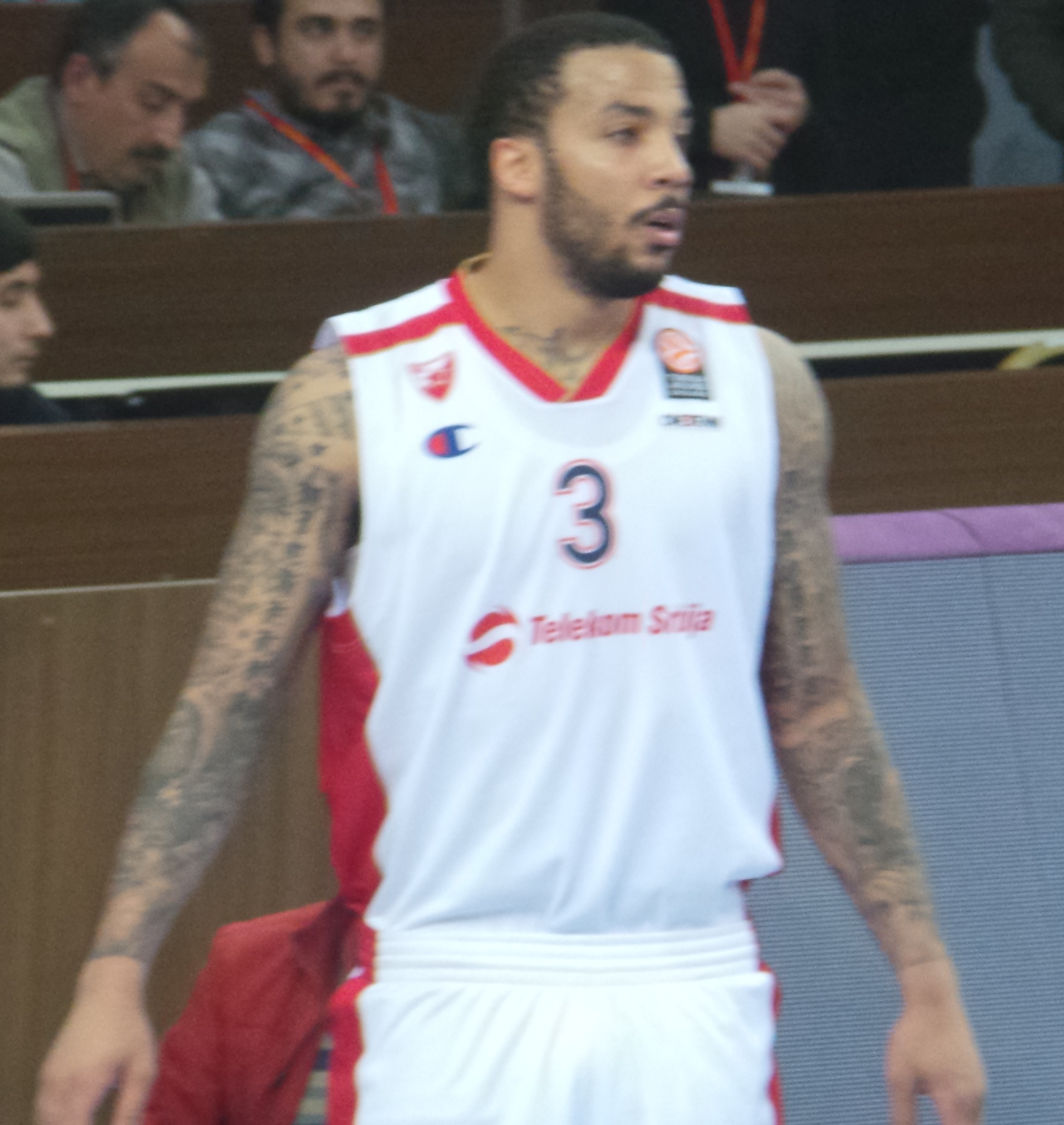 Marcus Williams